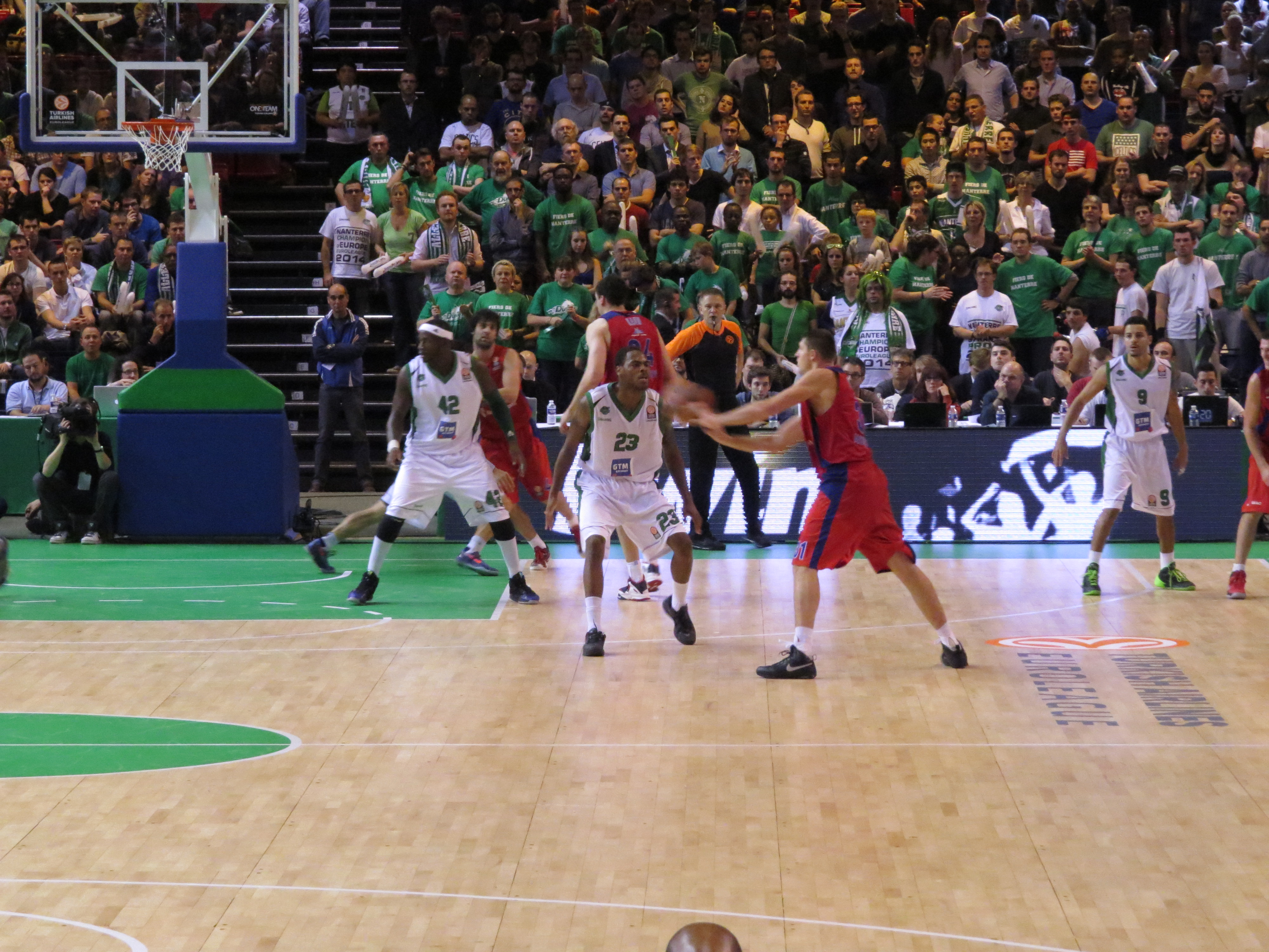 Match d'Euroligue entre Nanterre et le CSKA Moscou à la halle Carpentier (Paris). Victoire du CSKA 62-59.